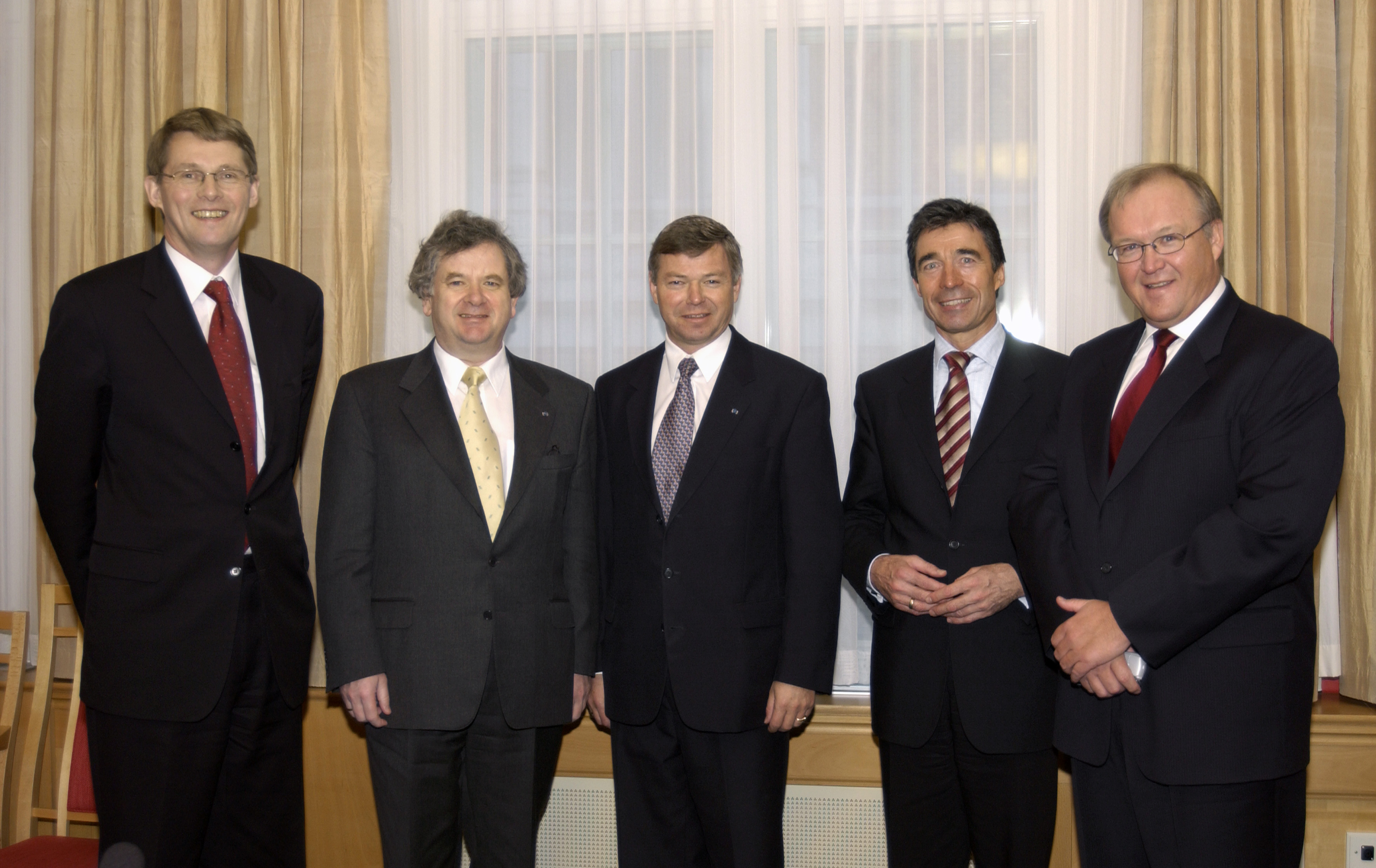 De Nordiska statsministrarna. (Bilden är tagen vid Nordiska rådets session i Oslo, 2003)